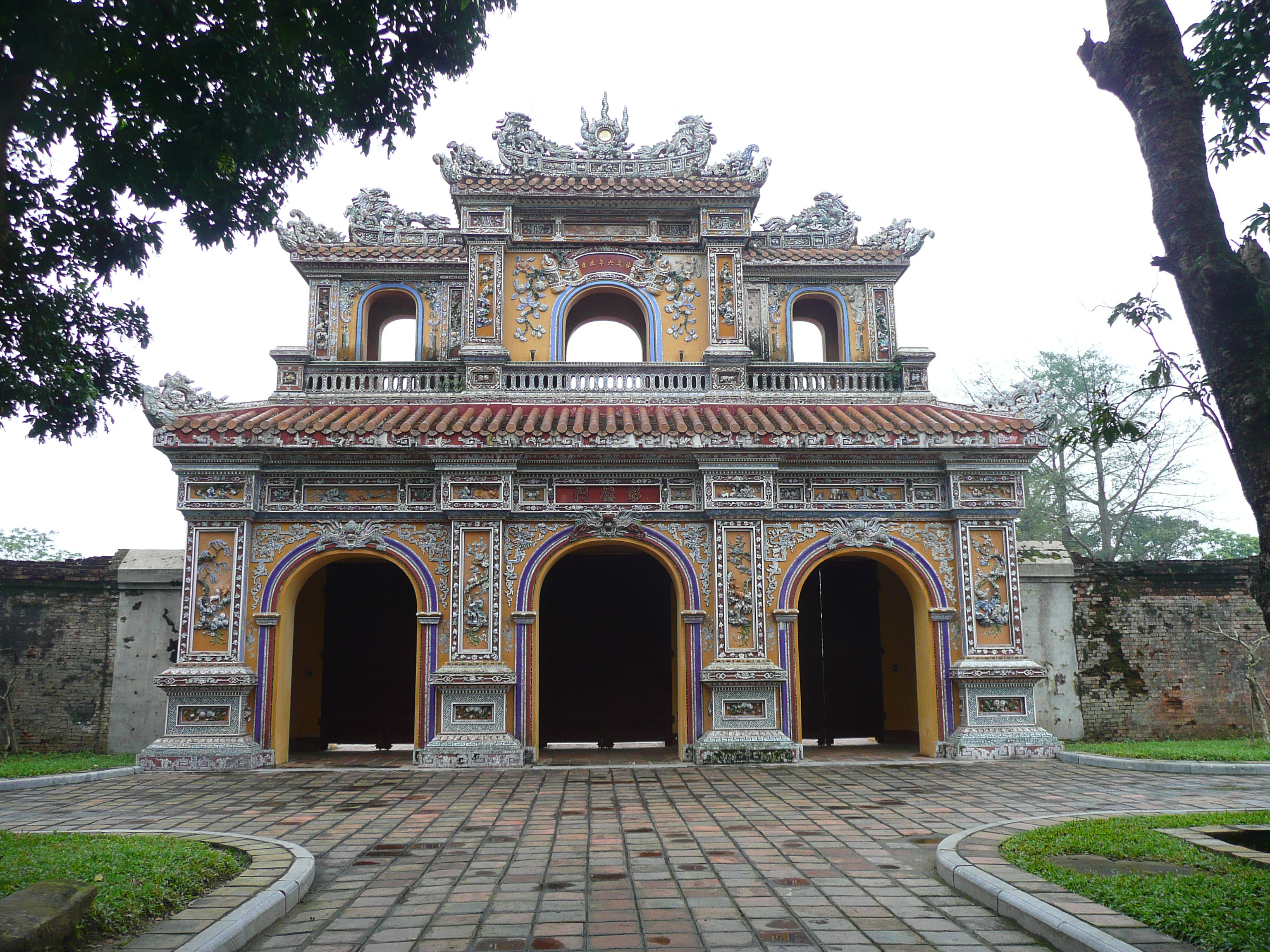 Citadel Hue